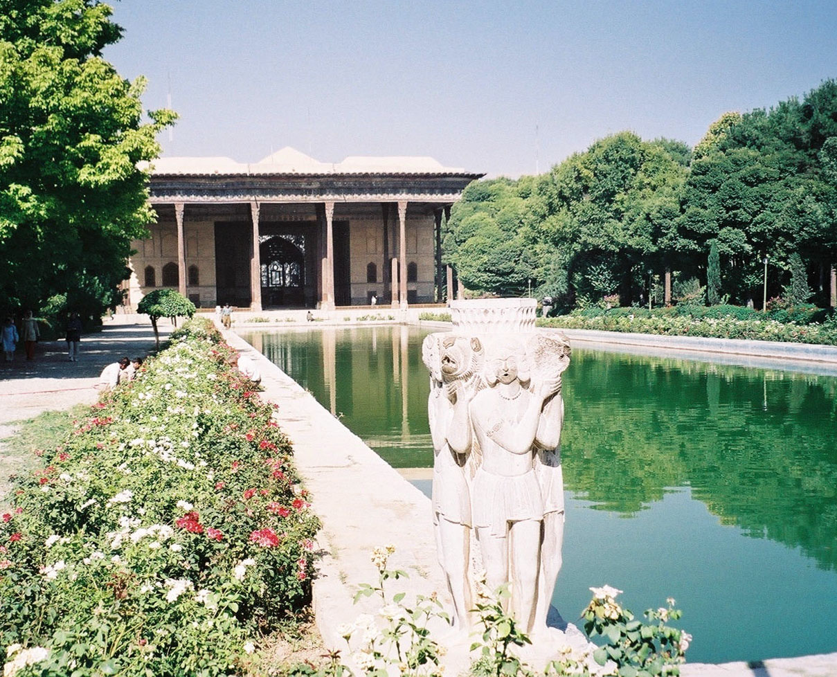 Palais dit des « 40 colonnes » construit comme hall de réception pat Chah Abbâs Ier au XVIIe siècle (Ispahan)